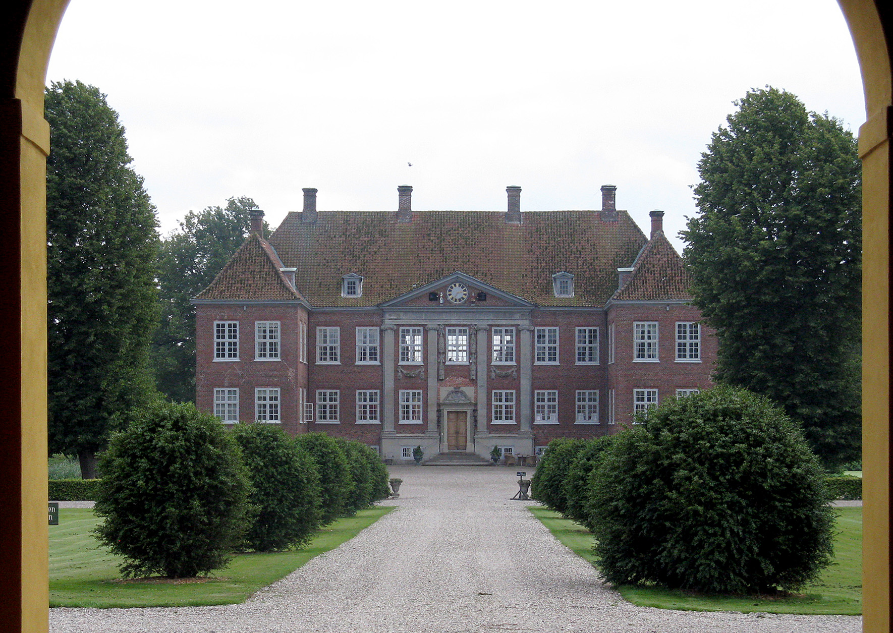 Nysø ved Præstø Sydsjælland